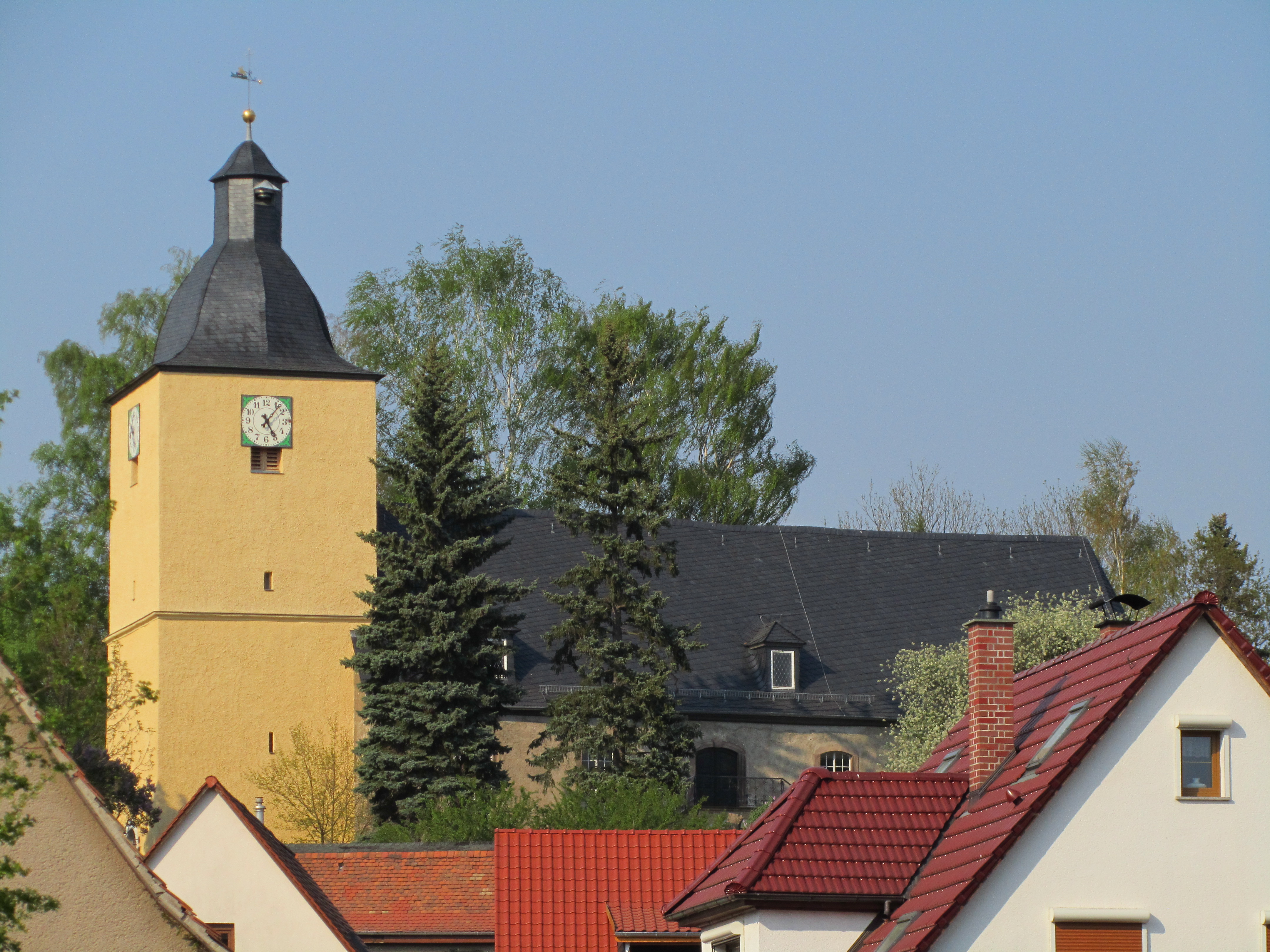 Die Kirche von Mellingen (Thüringen).